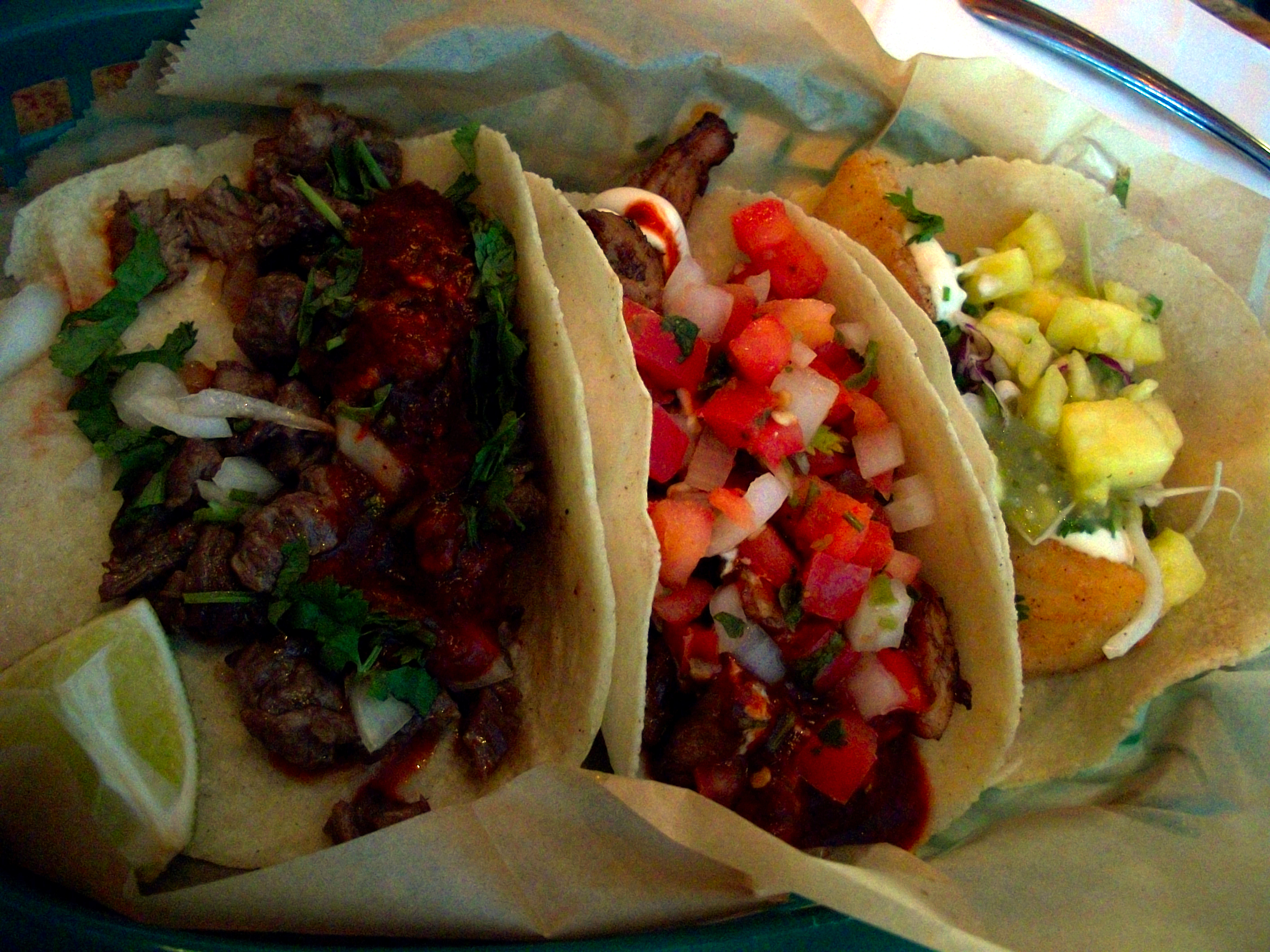 Por Que No Taqueria, Portland, Oregon